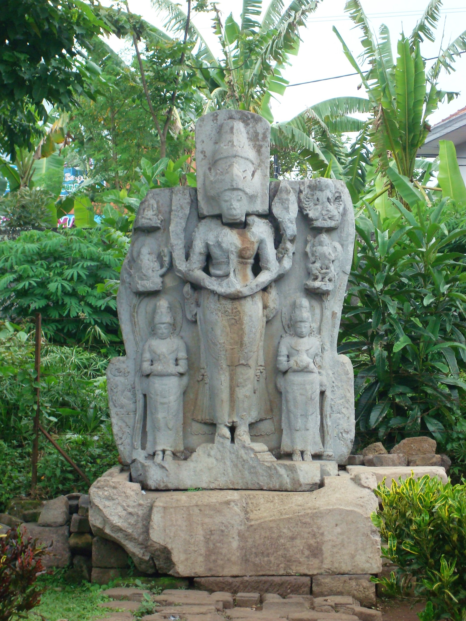 Giebelfeld beim Candi Singosari